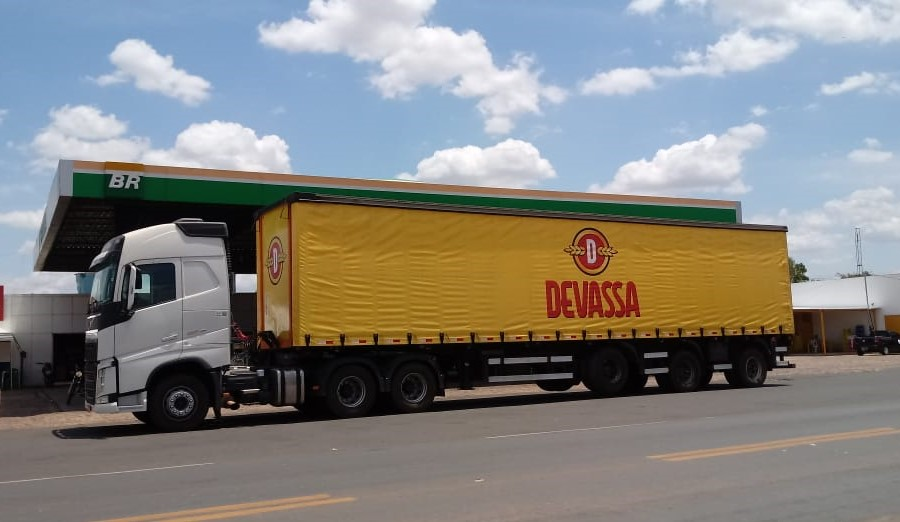 Caminhão carreta da Cervejaria brasileira Devassa na BR-343 em Campo Maior, Piauí.